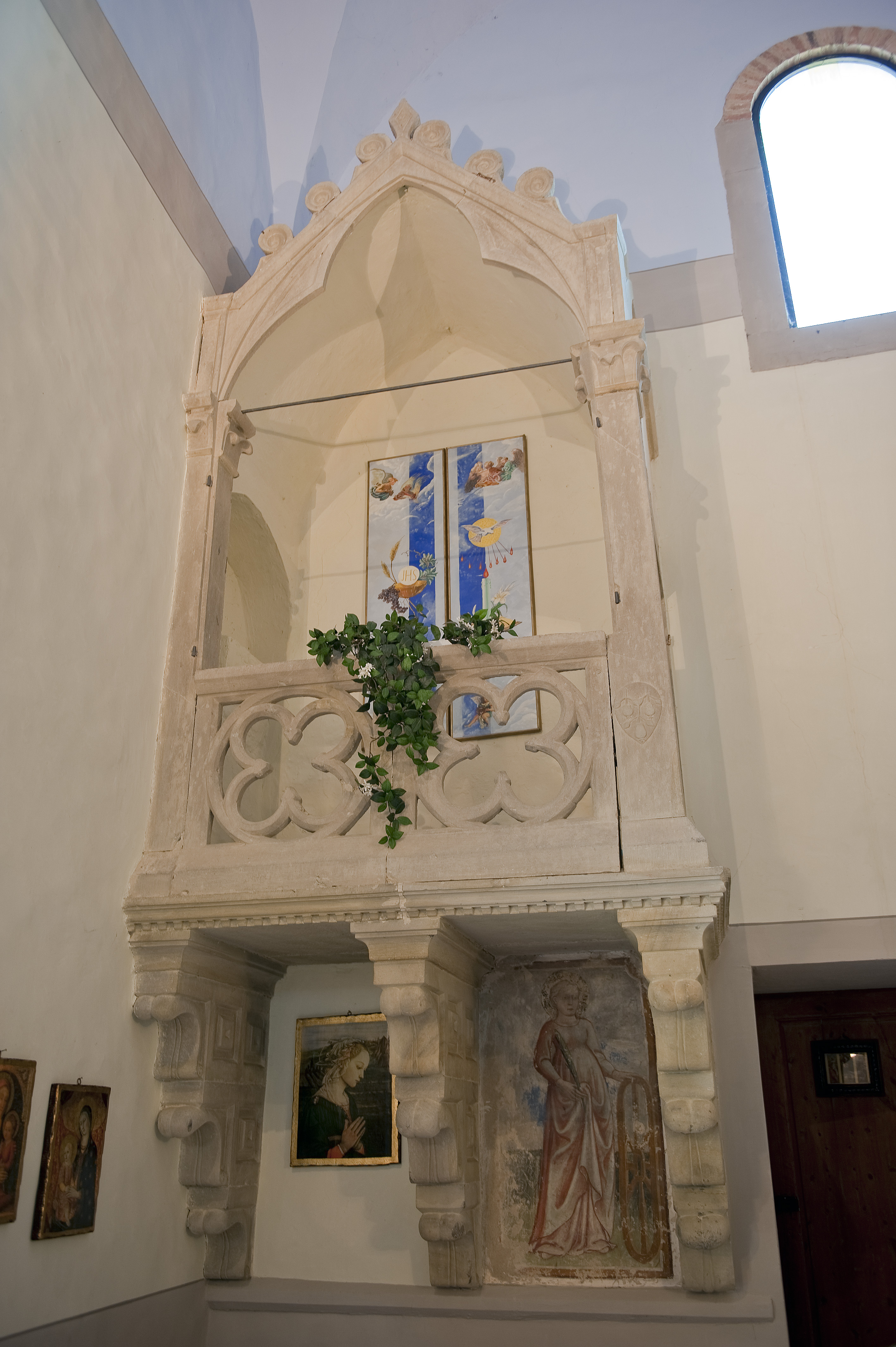 Edicola gotica (XIV secolo), posta all'interno dell'Oratorio di Sant'Eufròsino a Panzano in Chianti